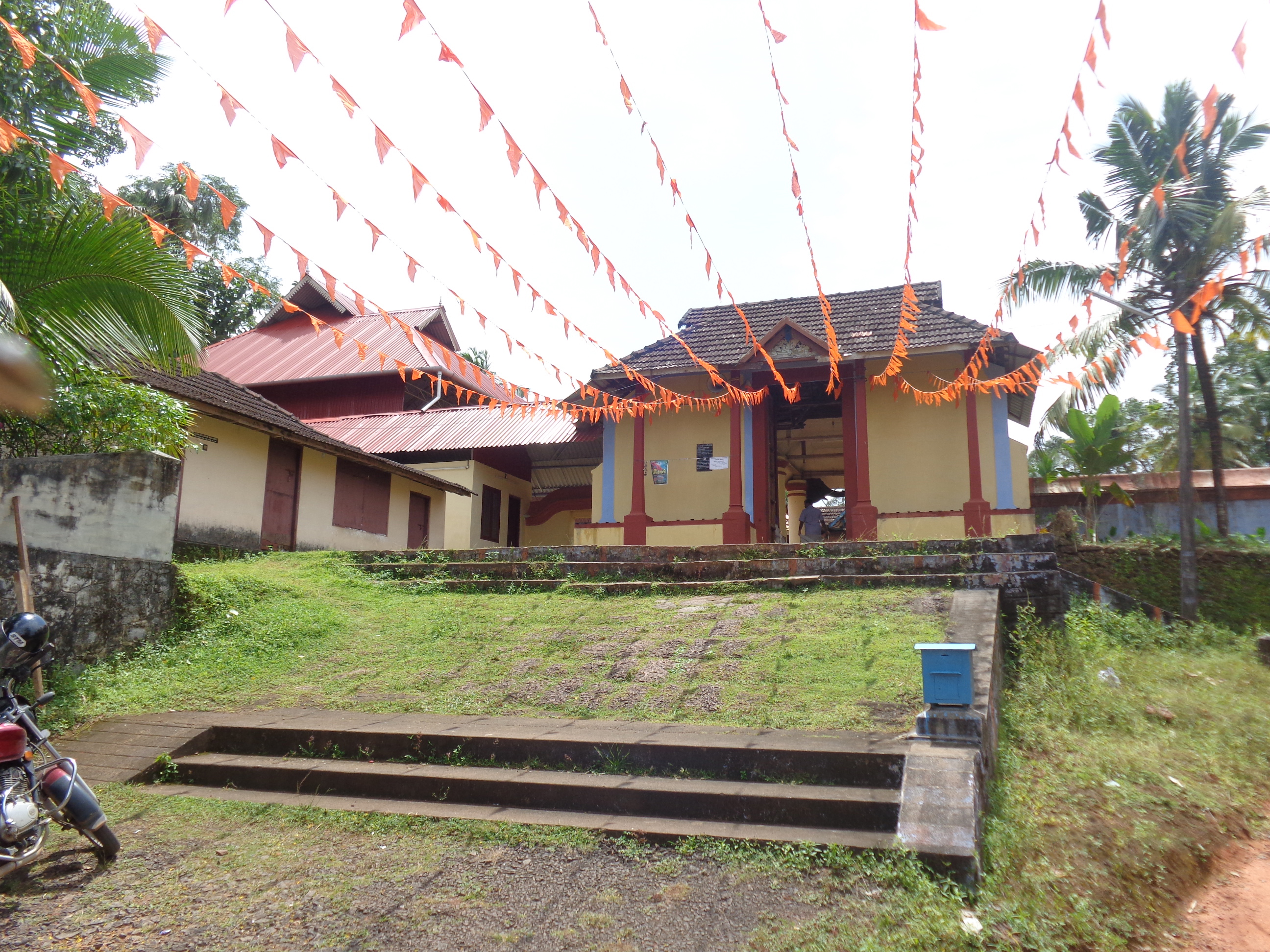 onamthuruth krishana temple, neendoor, kottayam